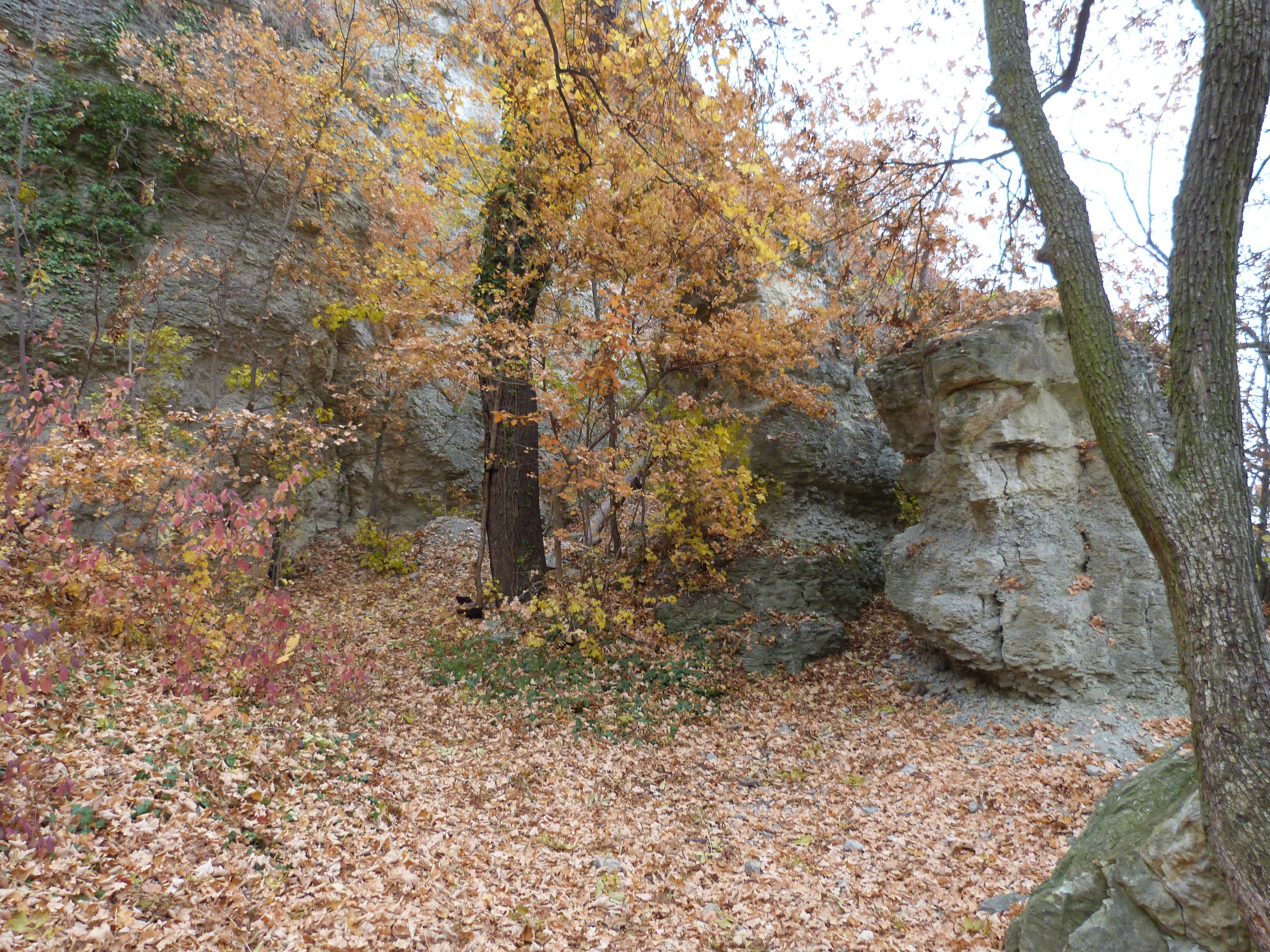 Das Foto zeigt einen Teil der Diebeskrippe, ein rezenter Bergrutsch, die auf der mittleren Horizontale im Osten Jenas liegt.